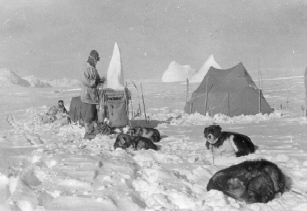 Esperanza y la Gran Travesía Invernal